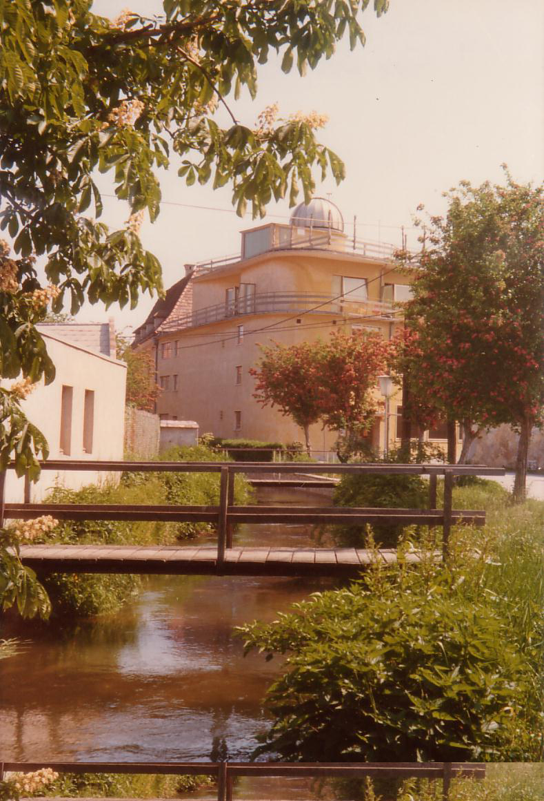 Aufnahme der Franz-Kroller-Sternwarte